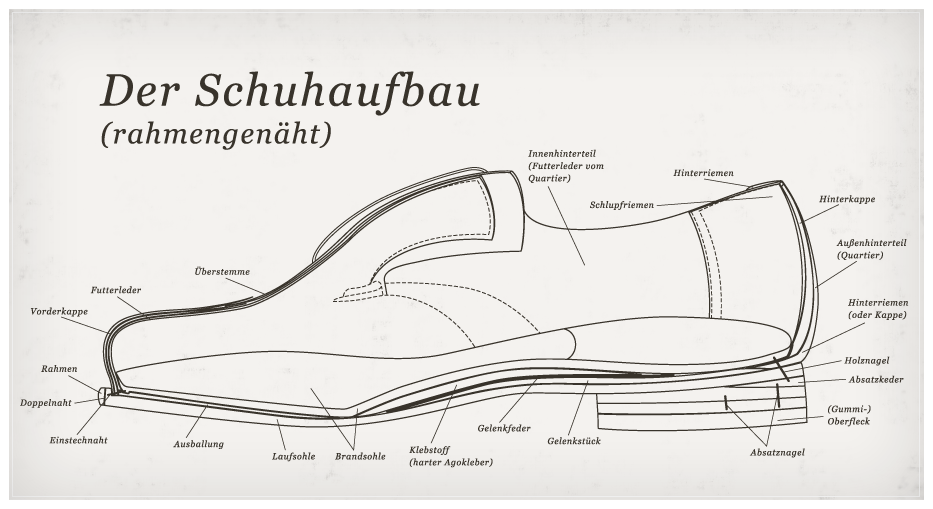 detaillierter Aufbau eines Herrenschuhs